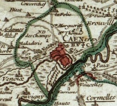 Carte du doyenné de Caen, extraite de la Carte topographique du diocèse de Bayeux